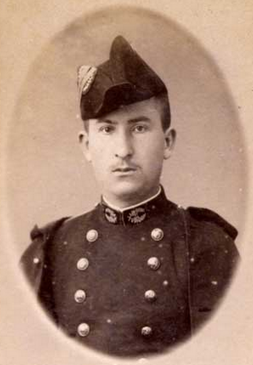 Ernest Cuvelette, né en 1869 et mort en 1936, dirigeant de la Compagnie des mines de Lens. La photographie a été prise lorsqu'il était élève à l'École Polytechnique.